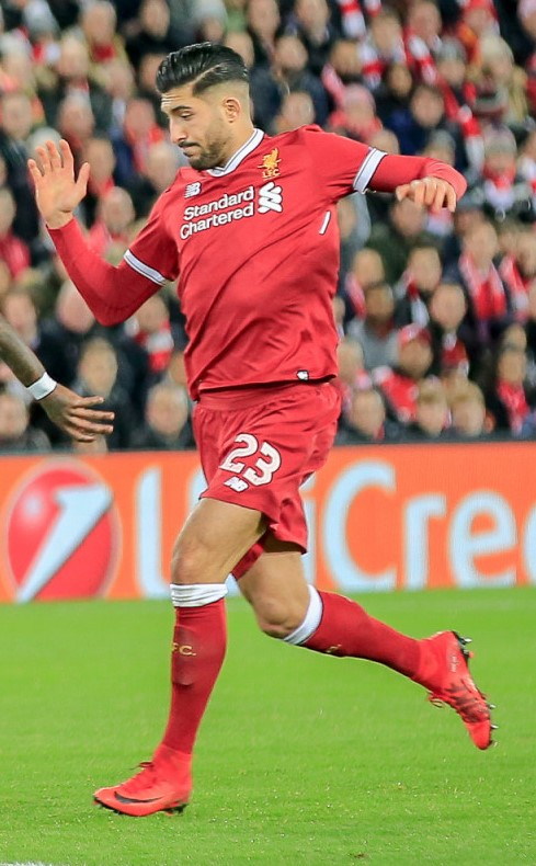 Emre Can